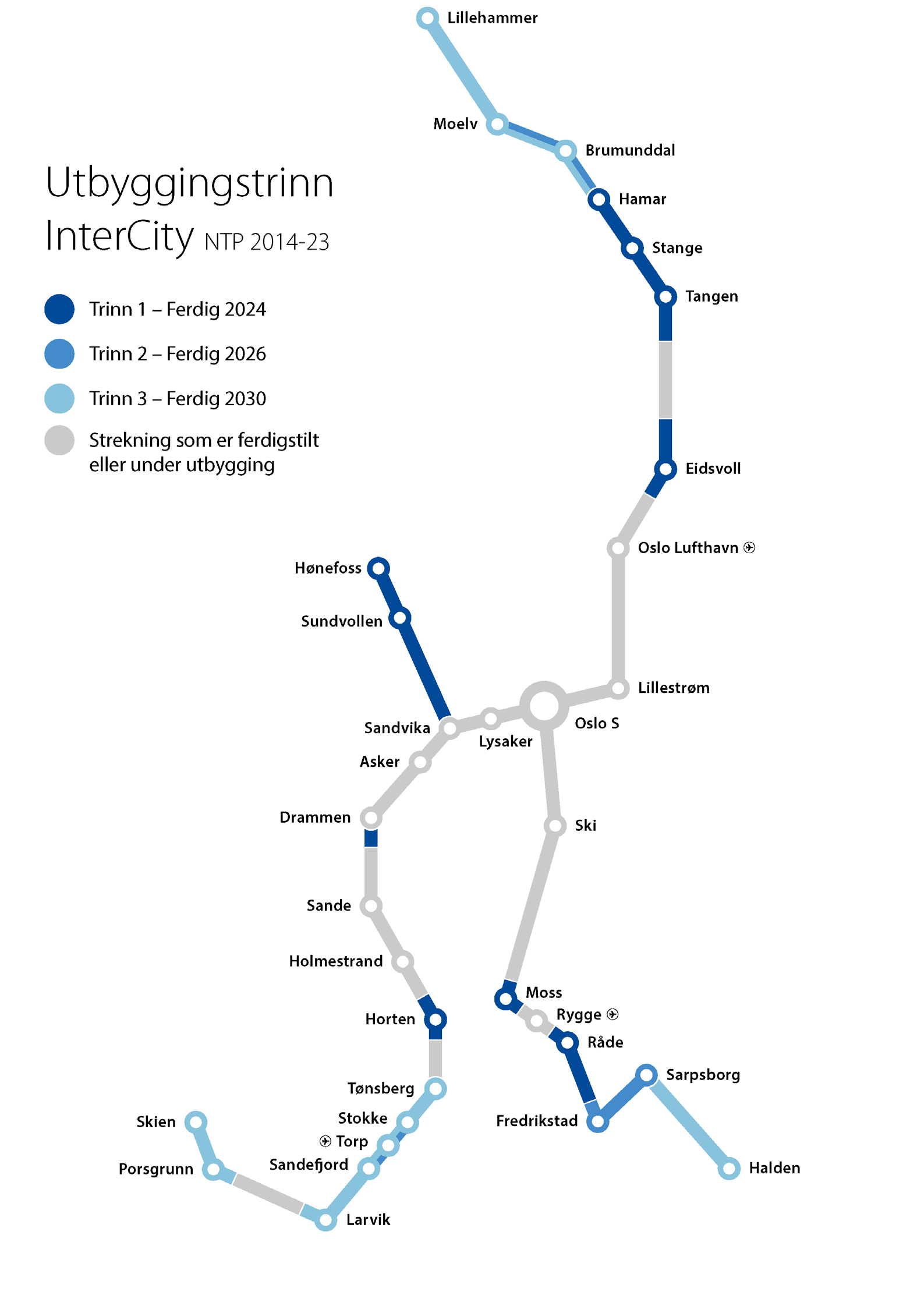 Kart over Utbyggingstrinn i Intercity-utbyggingen